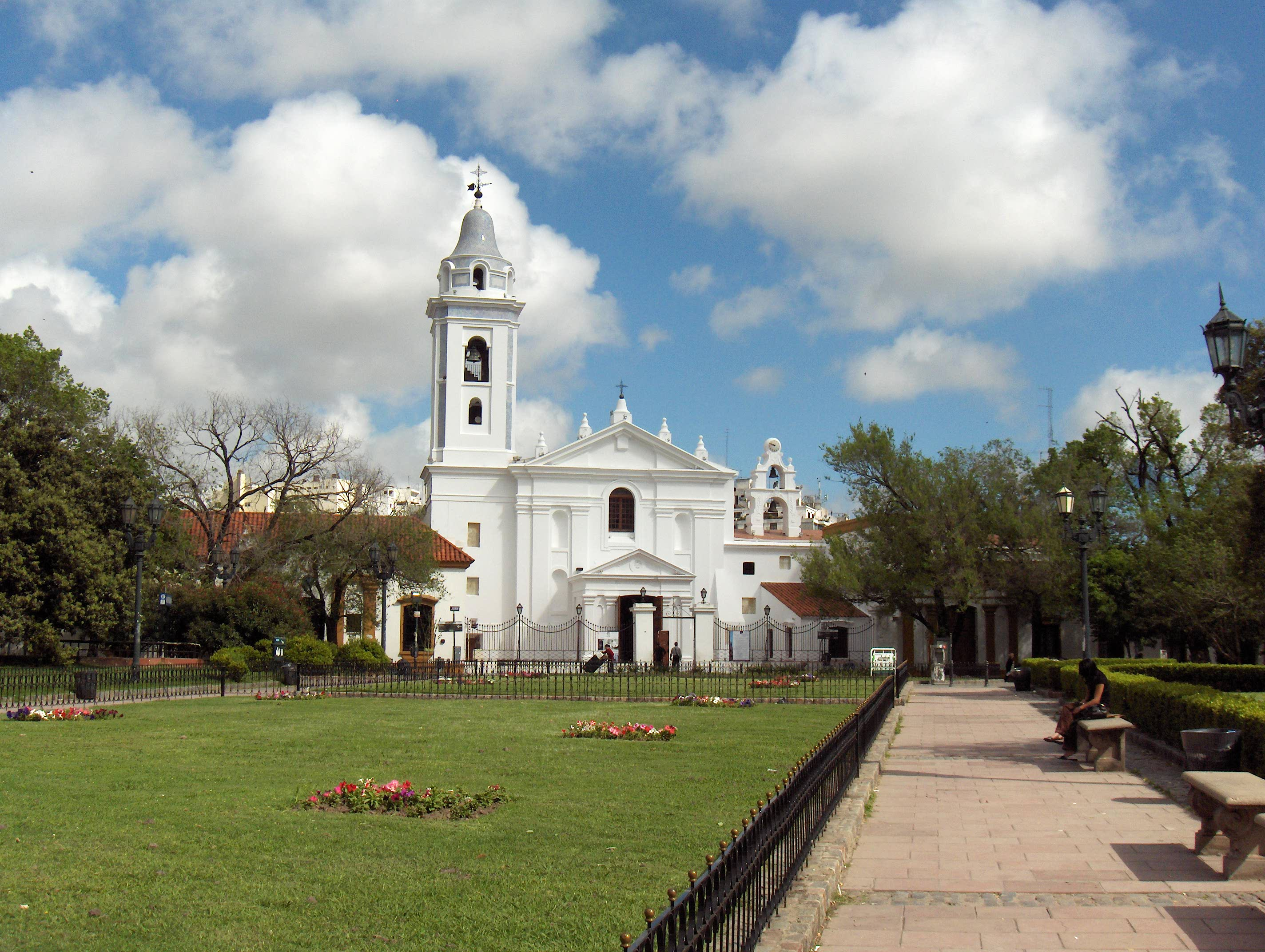 Iglesia Nuestra Señora del Pilar, ubicada en el barrio de Recoleta. Ciudad de Buenos Aires